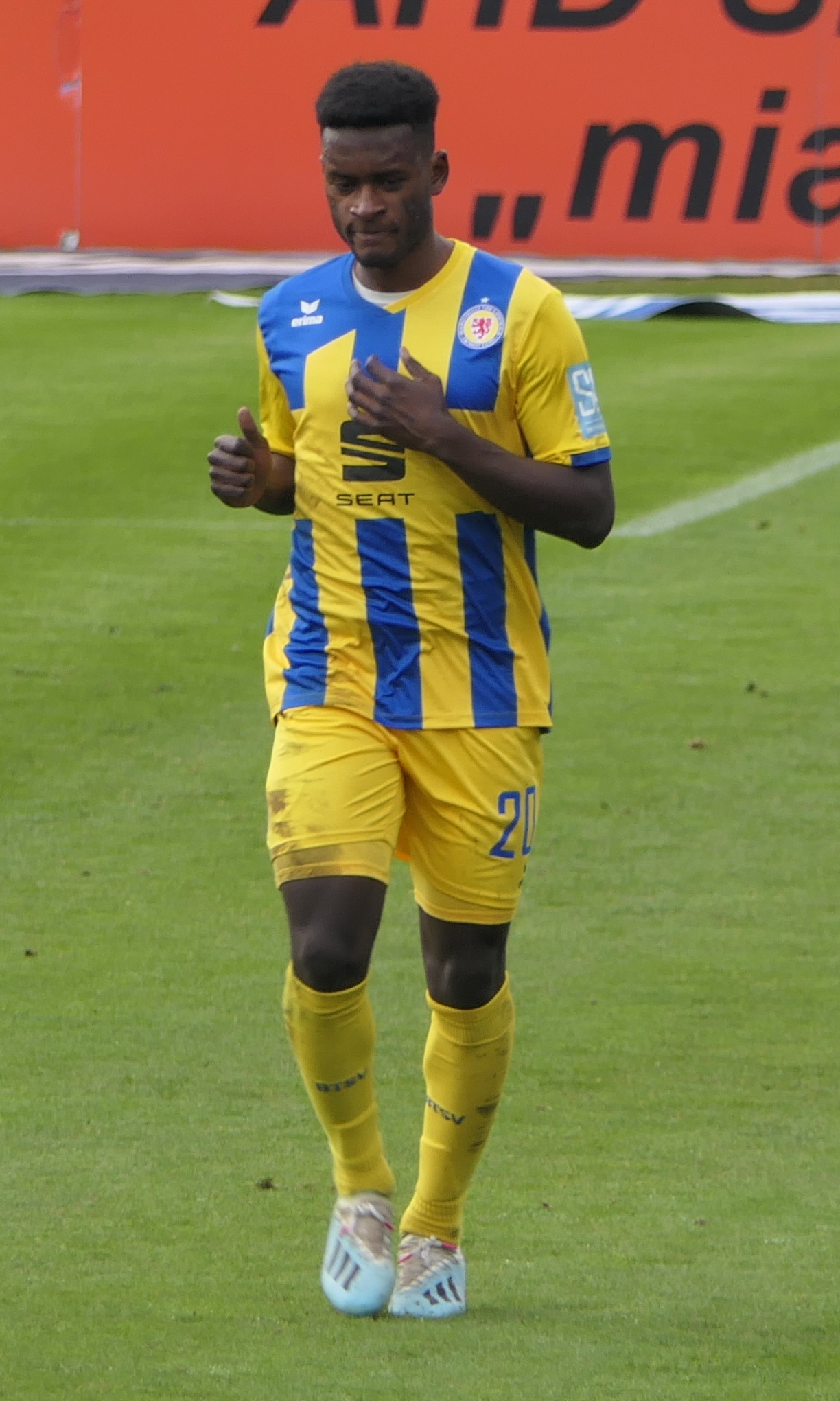 Der Fussballprofi Merveille Biankadi im Trikot von Eintracht Braunschweig beim Auswärtsspiel gegen den TSV 1860 München am 26.01.2020.